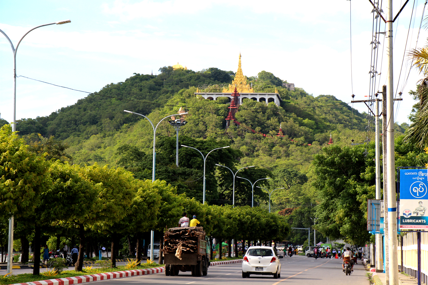 မြန်မာဘာသာ: မန္တလေးတောင်ကို အဝေးမှ မြင်ရပုံ